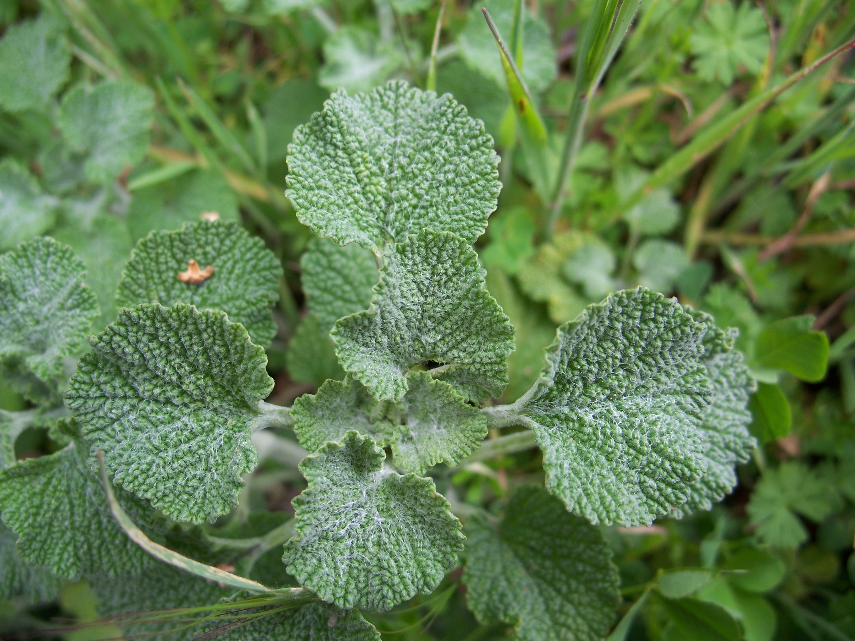 Marrubium vulgare Made in Los Gatos, California, USA. Identified by Franz Xaver.